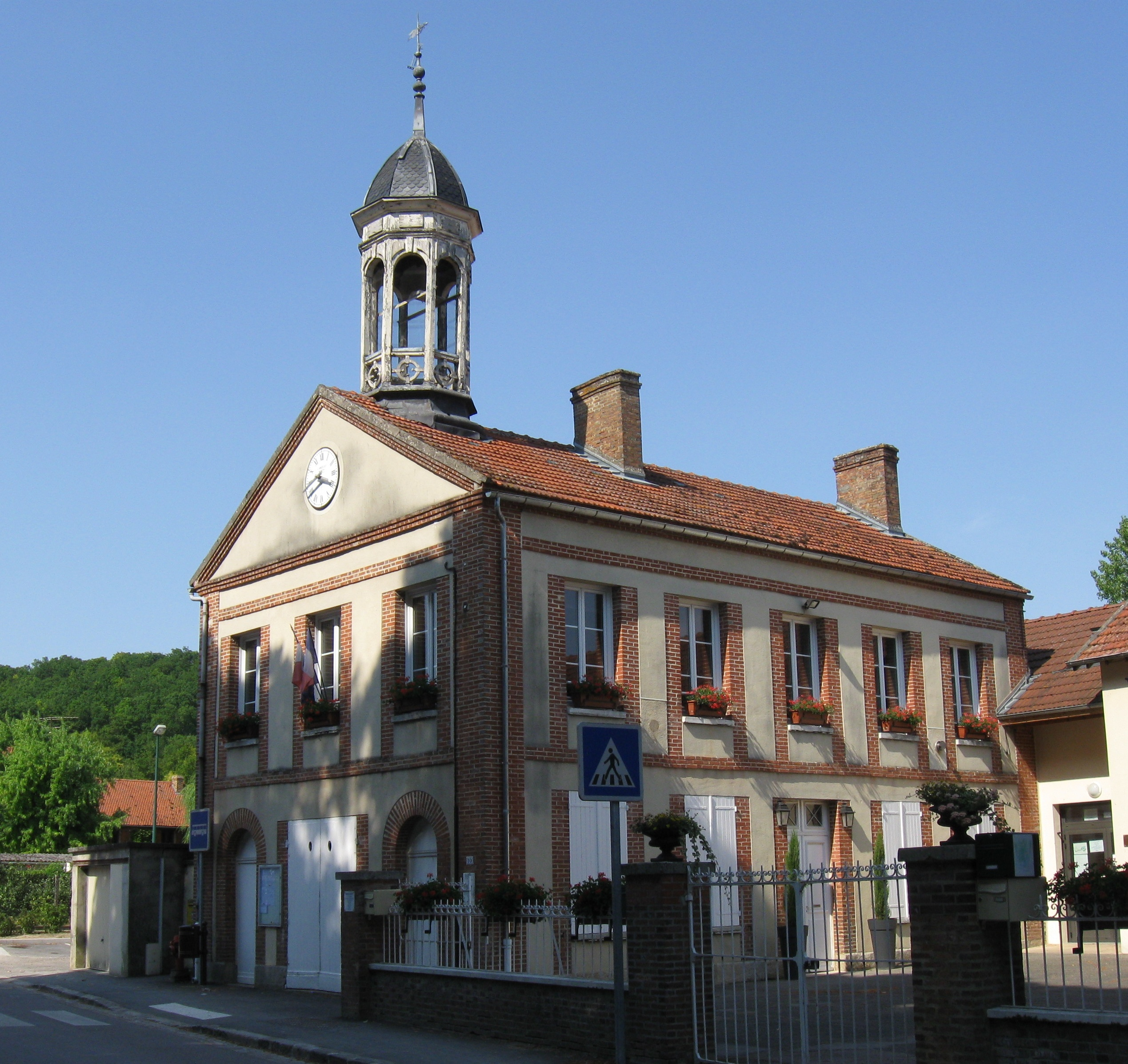 Mairie de La Saulsotte. (Aube, région Champagne-Ardenne).